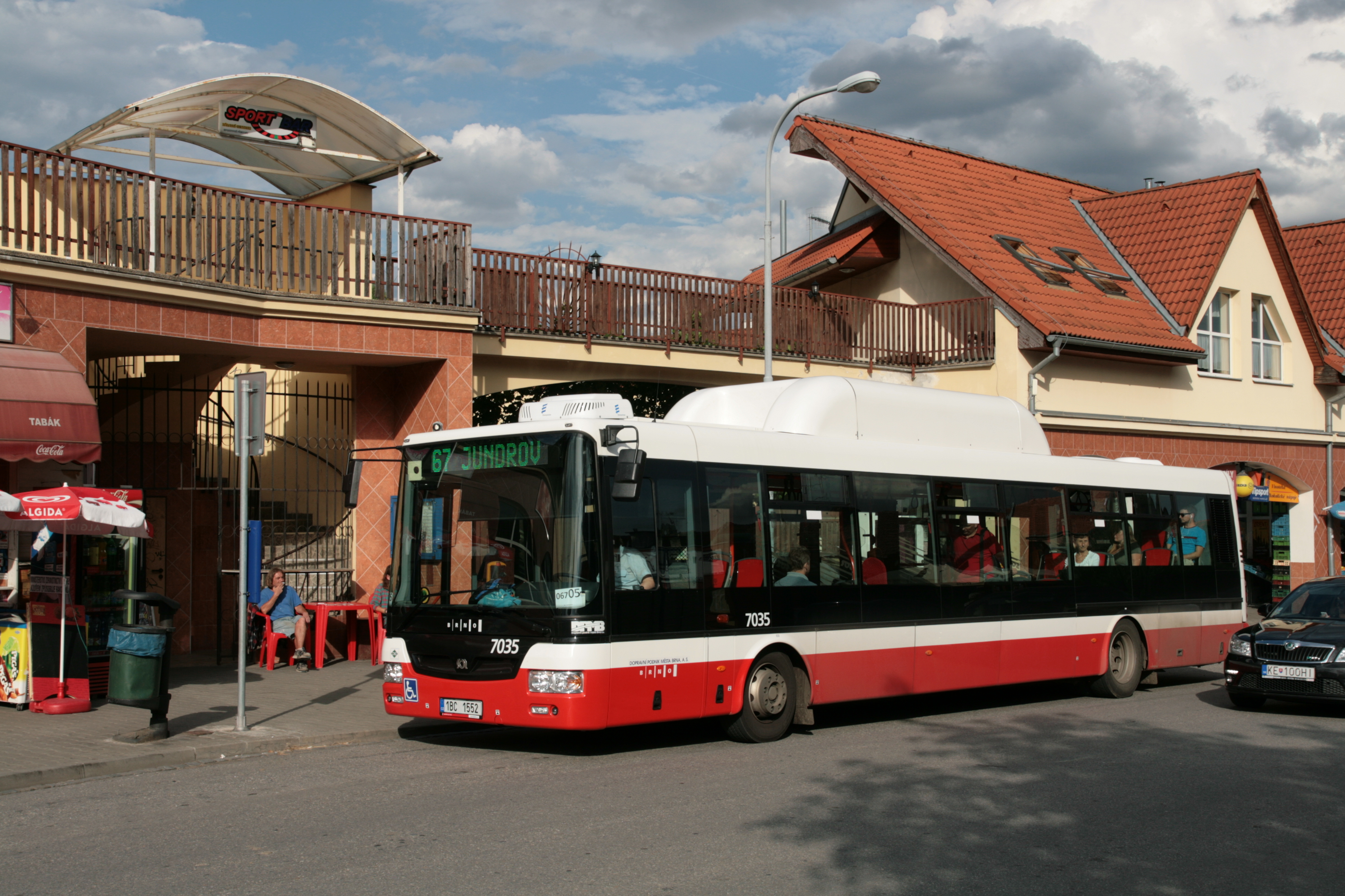 Autobusová zastávka Jundrov - Optátova s autobusem MHD linky 67. V pozadí dům Optátova 2a (Pizza Amici).